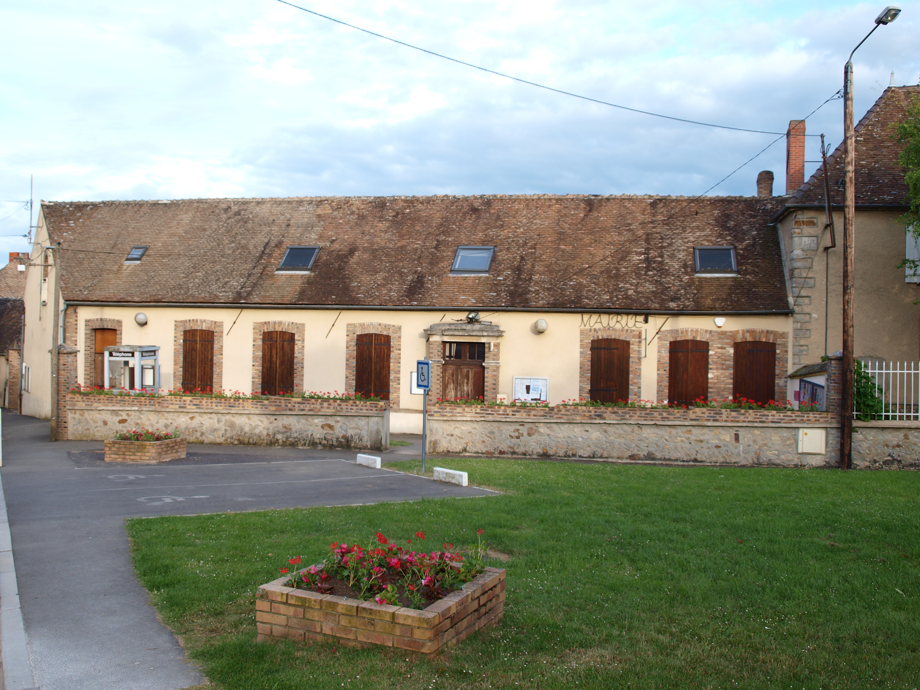 Mairie de Villemanoche (Yonne, France)